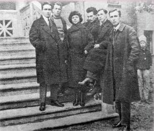 Украинские писатели литературной организации МАРС («Мастерская революционного слова»). 1925 год